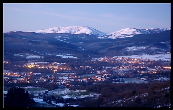 Murgia